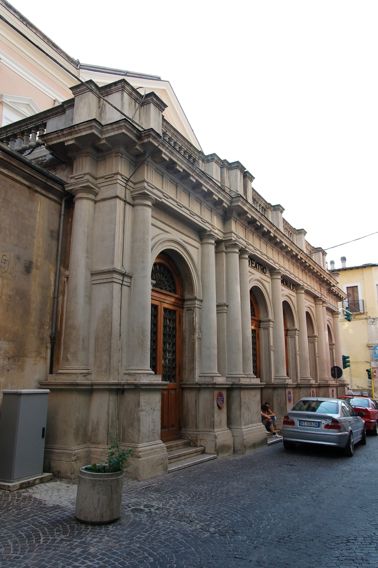 Sulmona 2011